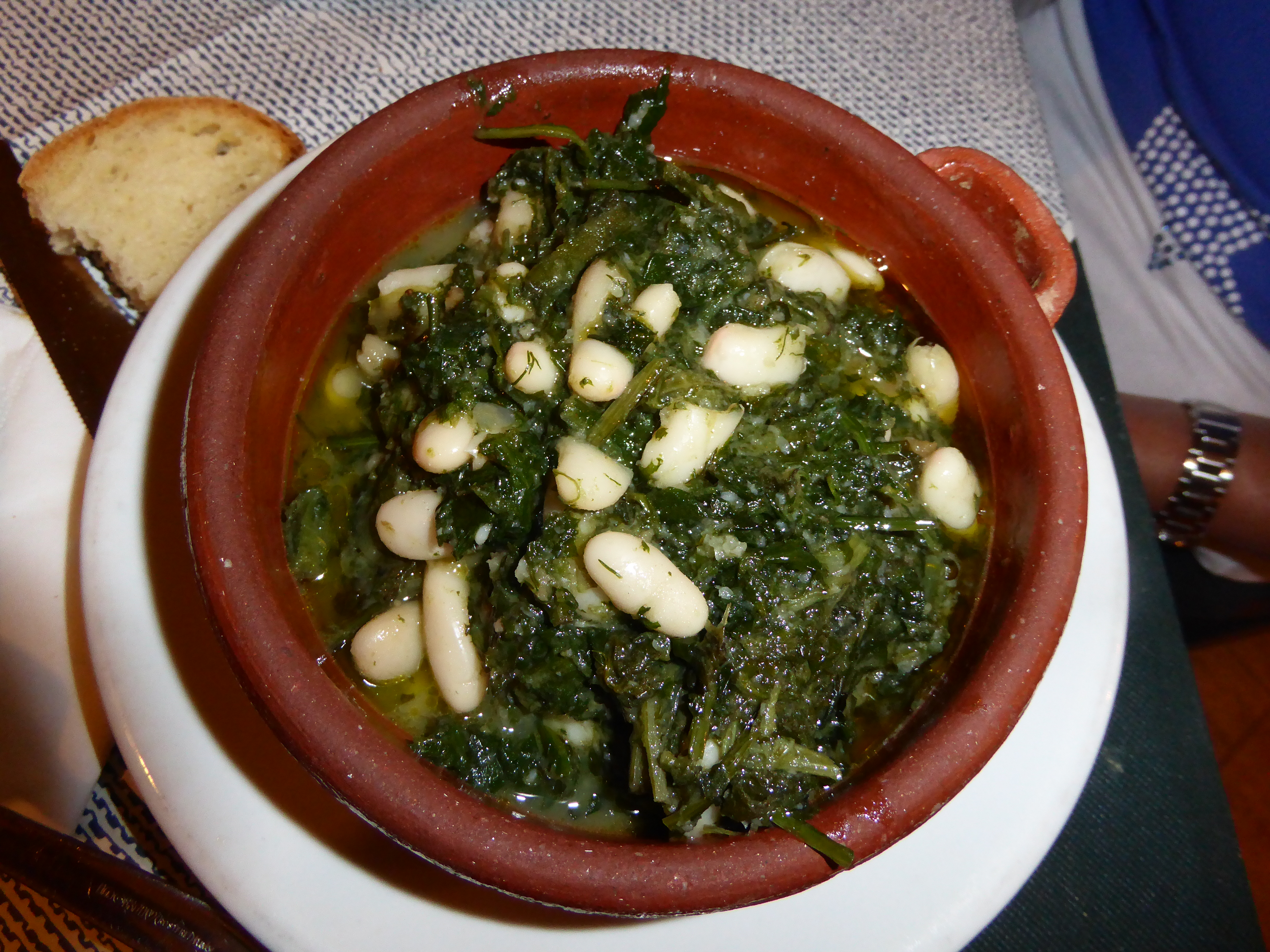 Finocchi e posa (2018)